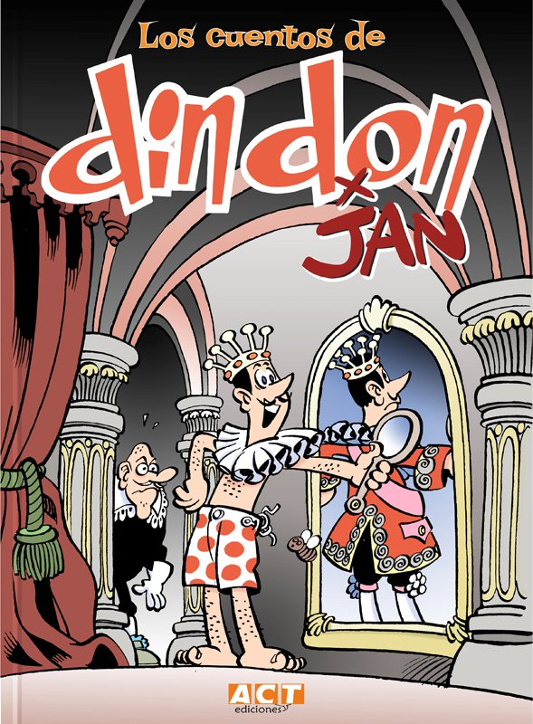 Portada del libro Los cuentos de Din Don (ACyT Ediciones 2015), con ilustración de Jan